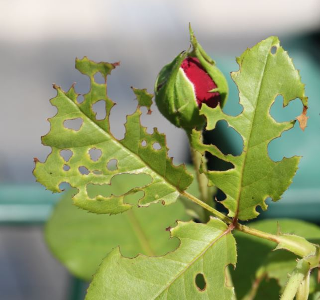 Schadbild an Rosen, vermutlich von der Weißgegürtelten Rosenblattwespe (Allantus cinctus)